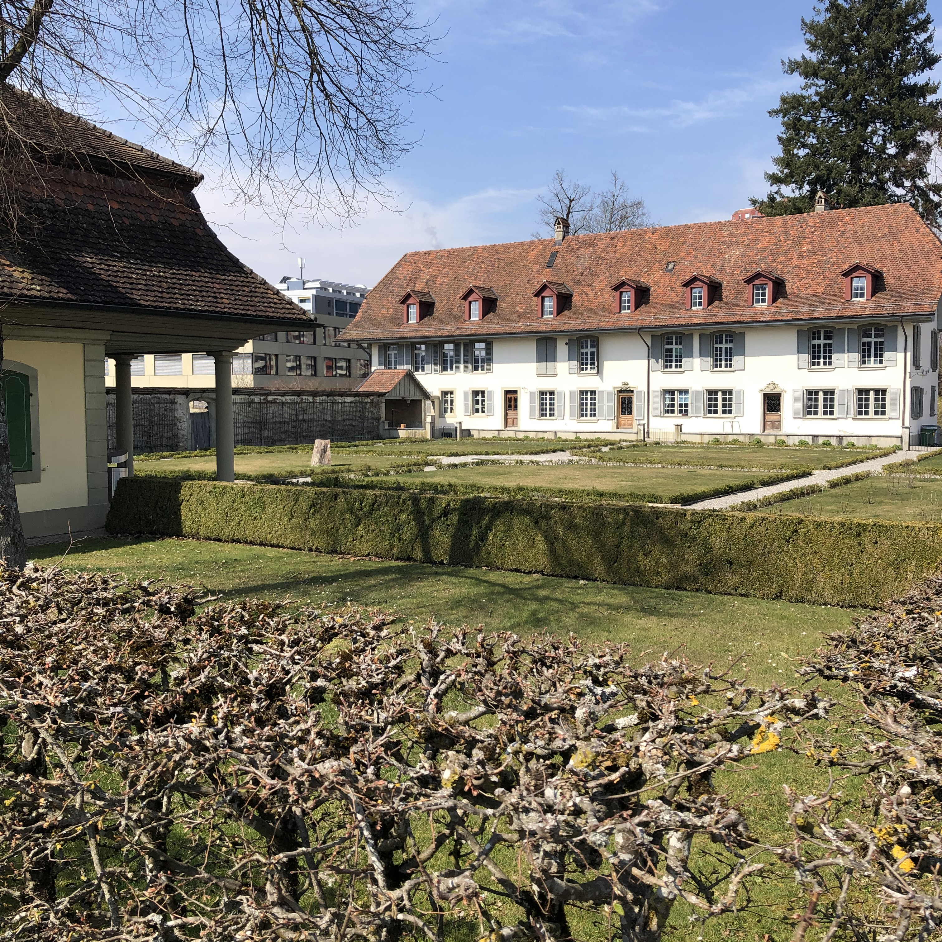 Das neu renovierte Herrenhaus im Park Brünnengut, im Vordergrund rechts der Pavillon